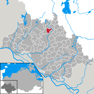 Gammelin in Mecklenburg-Vorpommern - district Ludwigslust